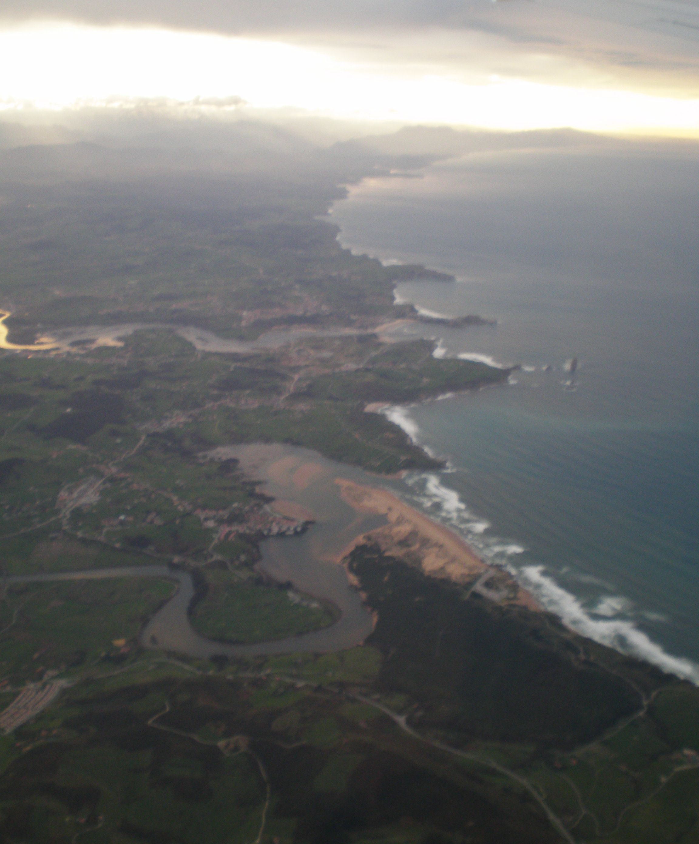 En primer plano abra del Pas o ría de Mogro, desembocadura del río Pas en el mar Cantábrico entre los municipios cántabros de Piélagos y Miengo, y playa de Valdearenas. Detrás desembocadura del río Saja-Besaya en la ría de San Martín de la Arena, entre Miengo y Suances. Montañés: En primer planu abra'l Pas o la ría Mogru, desembocaura'l ríu Pas nel mar Cantábricu enti los concejos cántabros de Piélagos y Miengu, y sable de Valdearenas. Tres d'ellu desembocaura'l ríu Saḥa-Besaya ena ría Samartín, enti Miengu y Suancis.